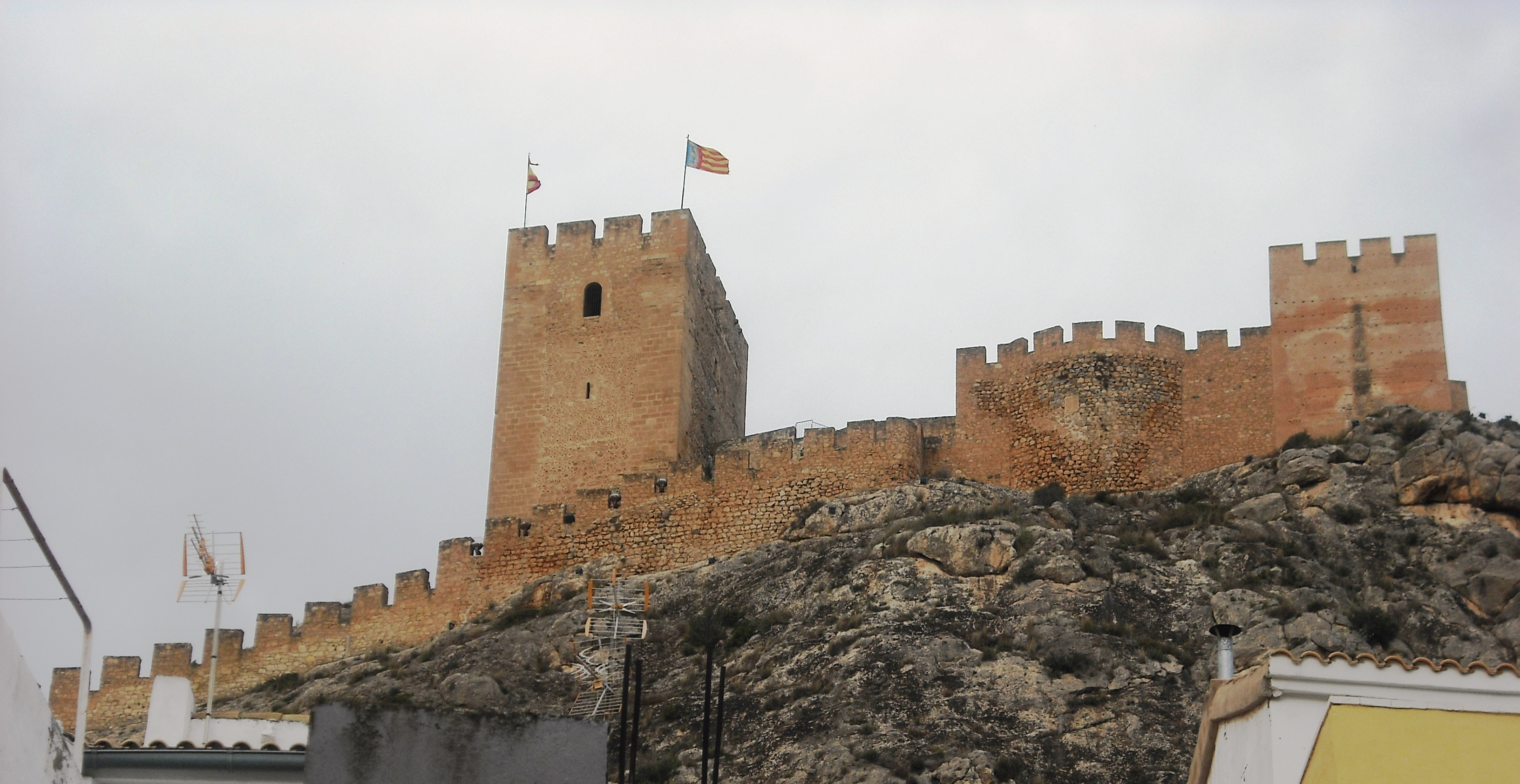 Castillo de Sax.